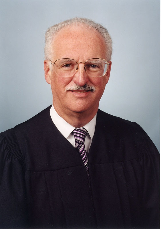 Douglas H. Ginsburg